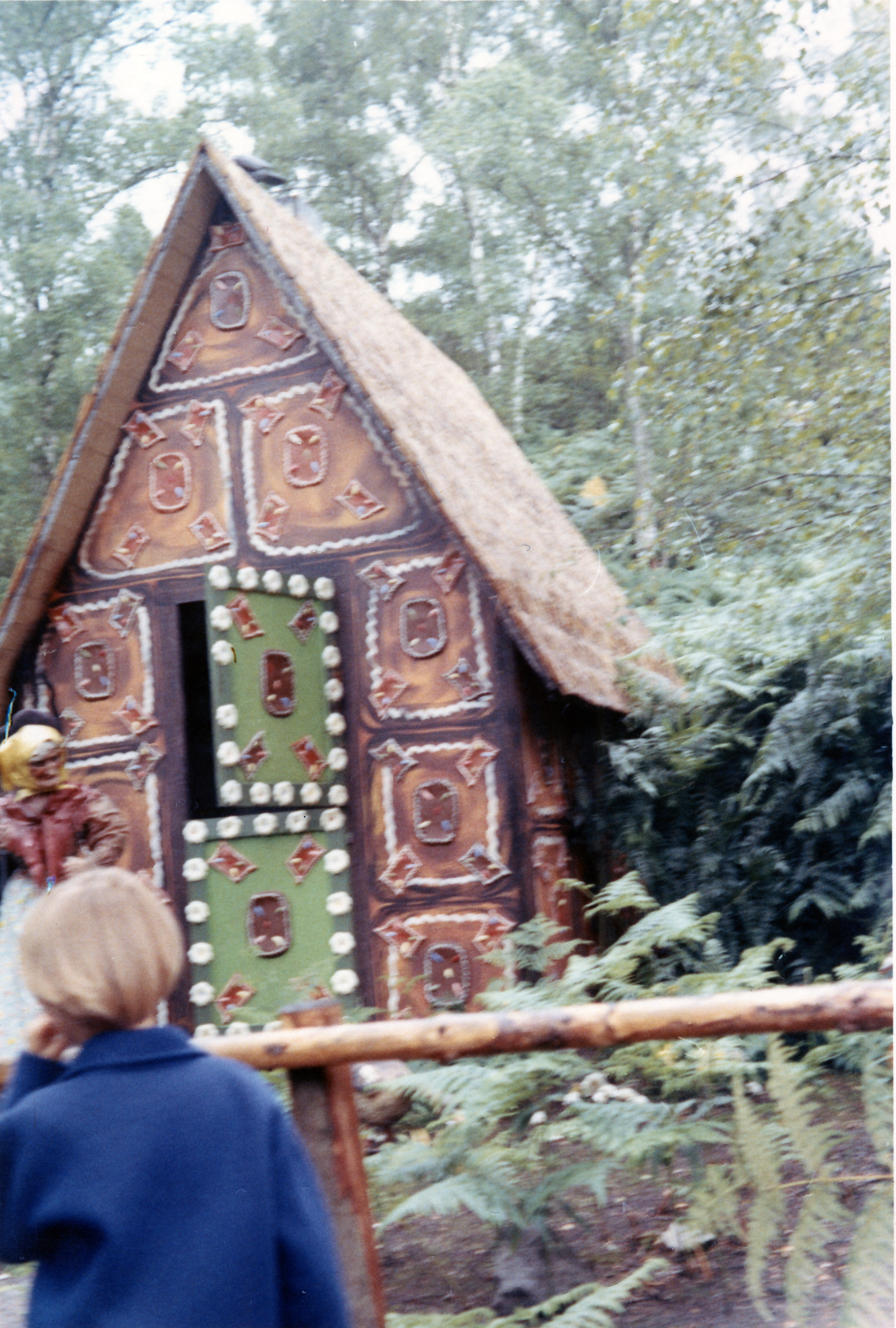 Ermenonville La Mer De Sable - La maison de la sorcière - 1966